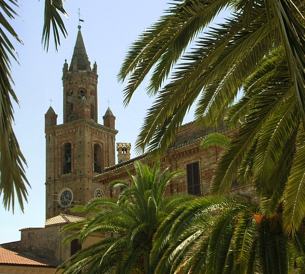 Corropoli categorie:Afbeelding Abruzzen